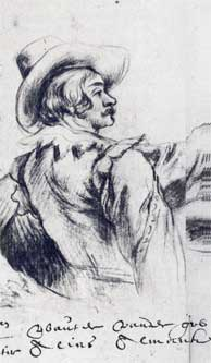 Wouter Crabeth II (detail van een grotere tekening)